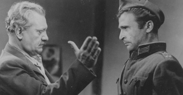 Филмът "Тревога"